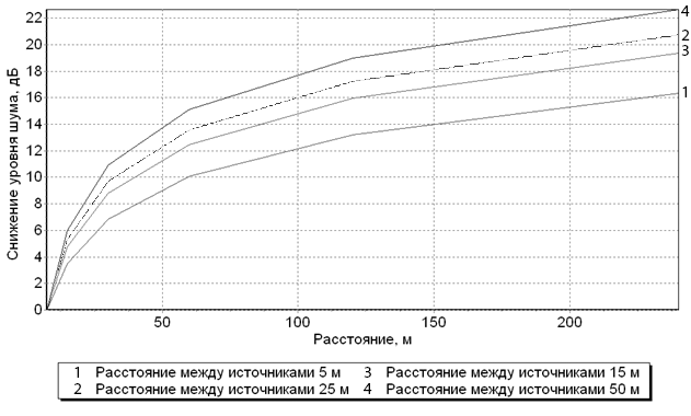 Фиг. 1. Абсолютно намаление на нивото на звука от квазицилиндричен източник с безкрайна дължина при различни разстояния между единичните източници.